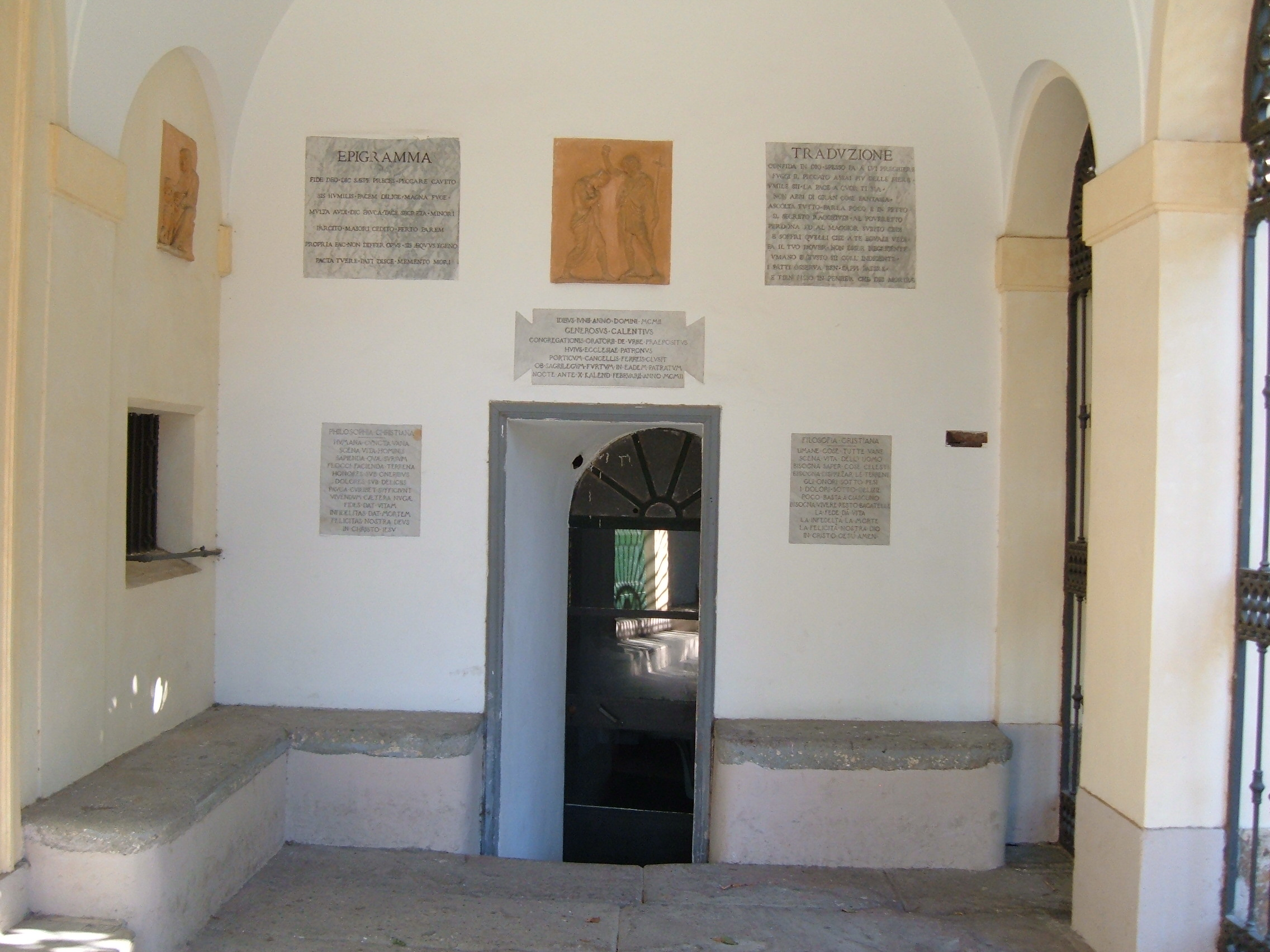 La chiesa dei Santi Isidoro ed Eurosia nel quartiere Ostiense a Roma. Atrio d'ingresso.